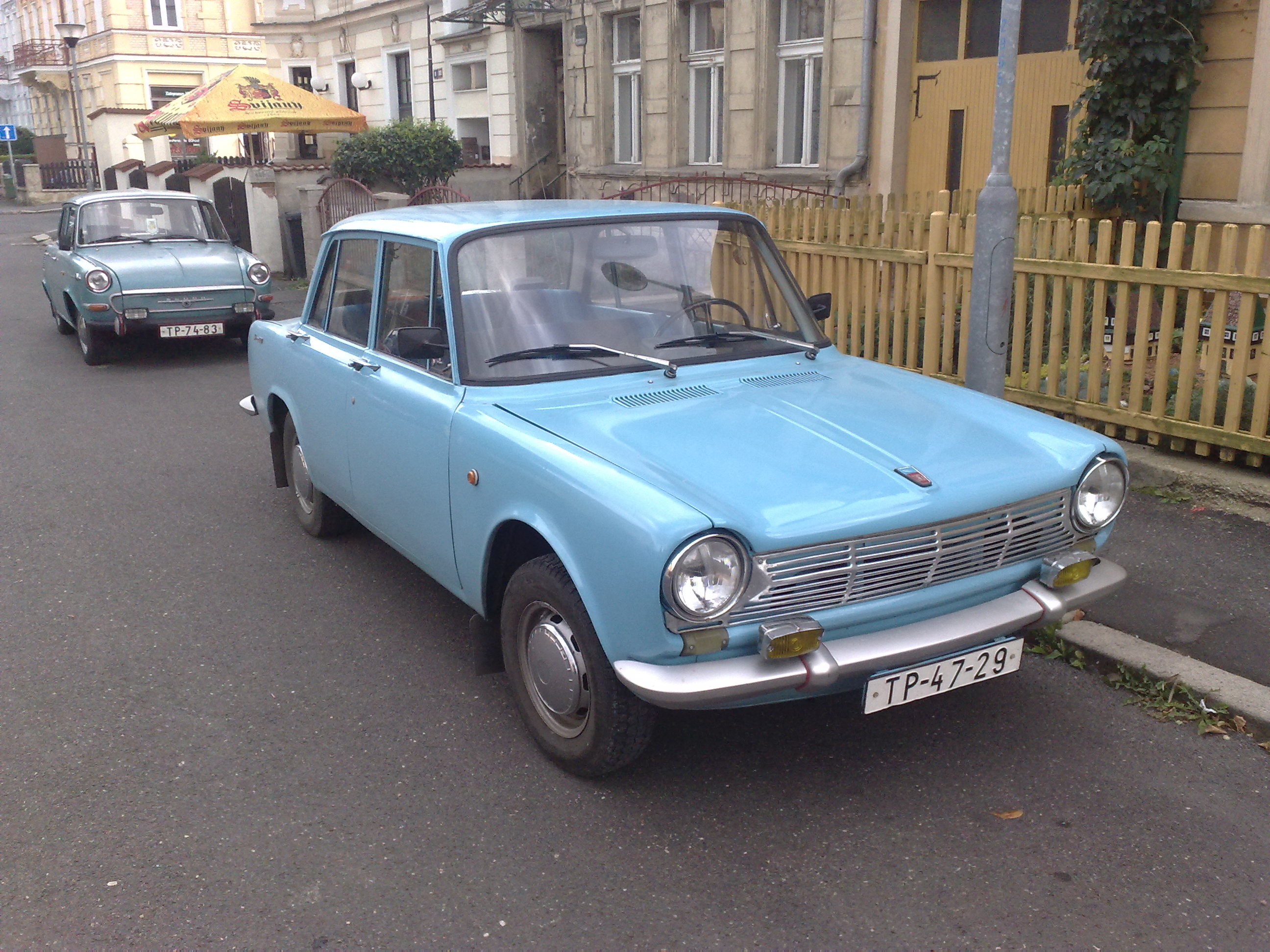 Simca 1300/1500 v pozadí Škoda 1000 MB. Fotografie pořízena v Teplicích, v severních Čechách.